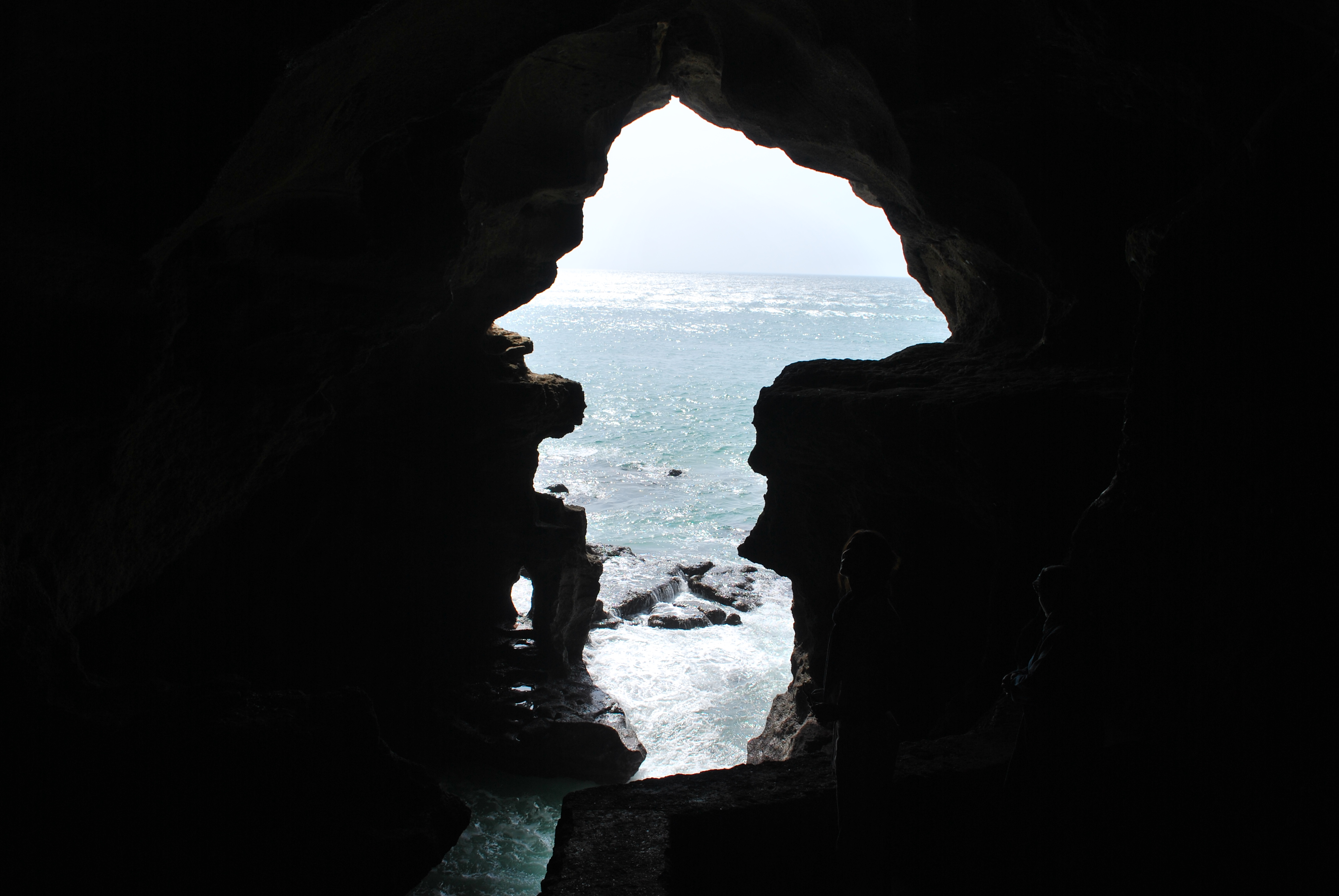 atlantikseitige Öffnung der "Grotte d'Hercule", aufgenommen August 2010